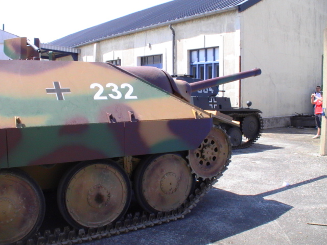 hetzer à Saumur (encore en état de marche)